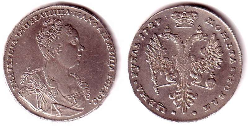 Рубль Екатерины I. Серебро, 28,11 гр.